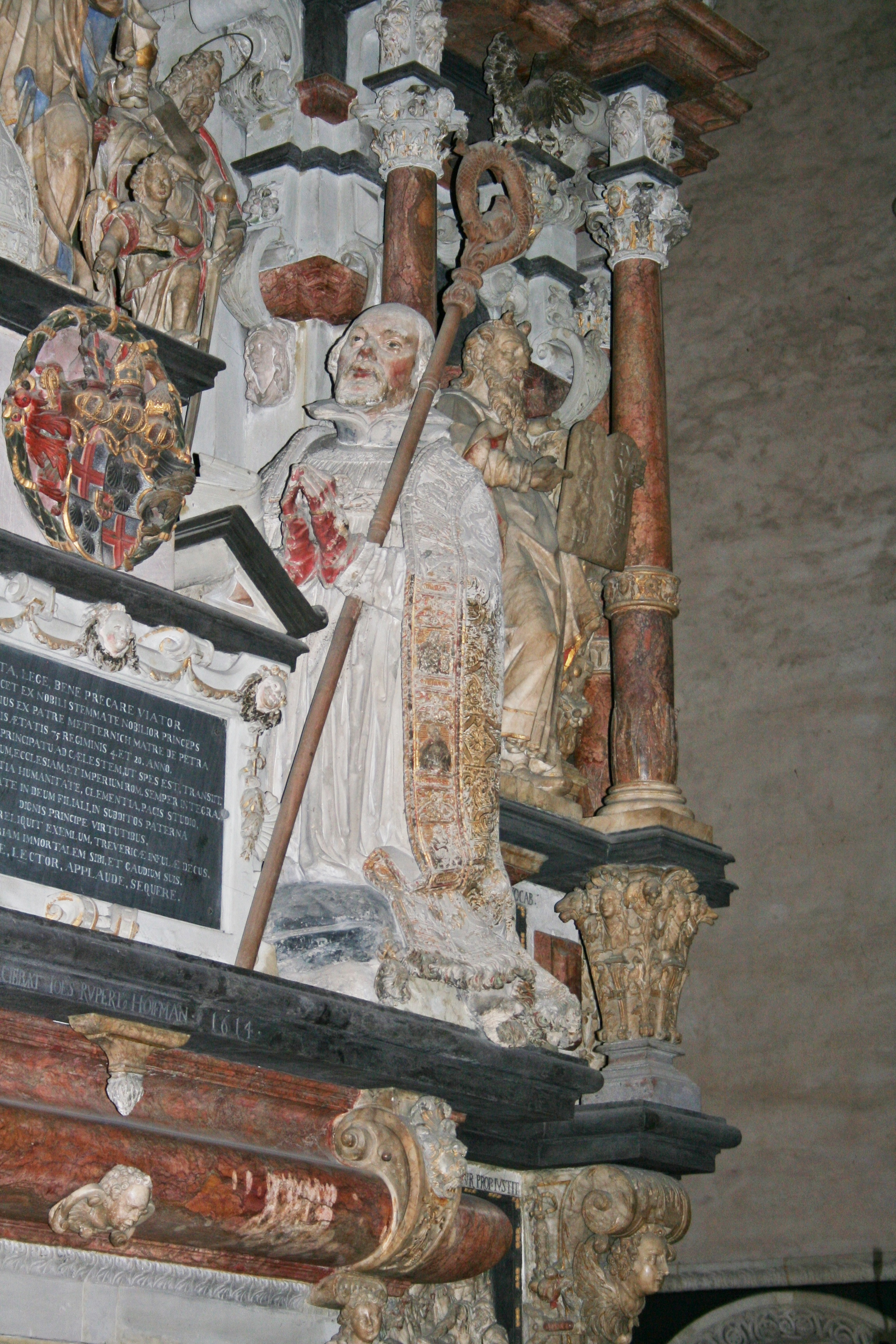 Bischof Lothar von Metternich, Portraitstatue auf dem Grabaltar, Dom, Trier